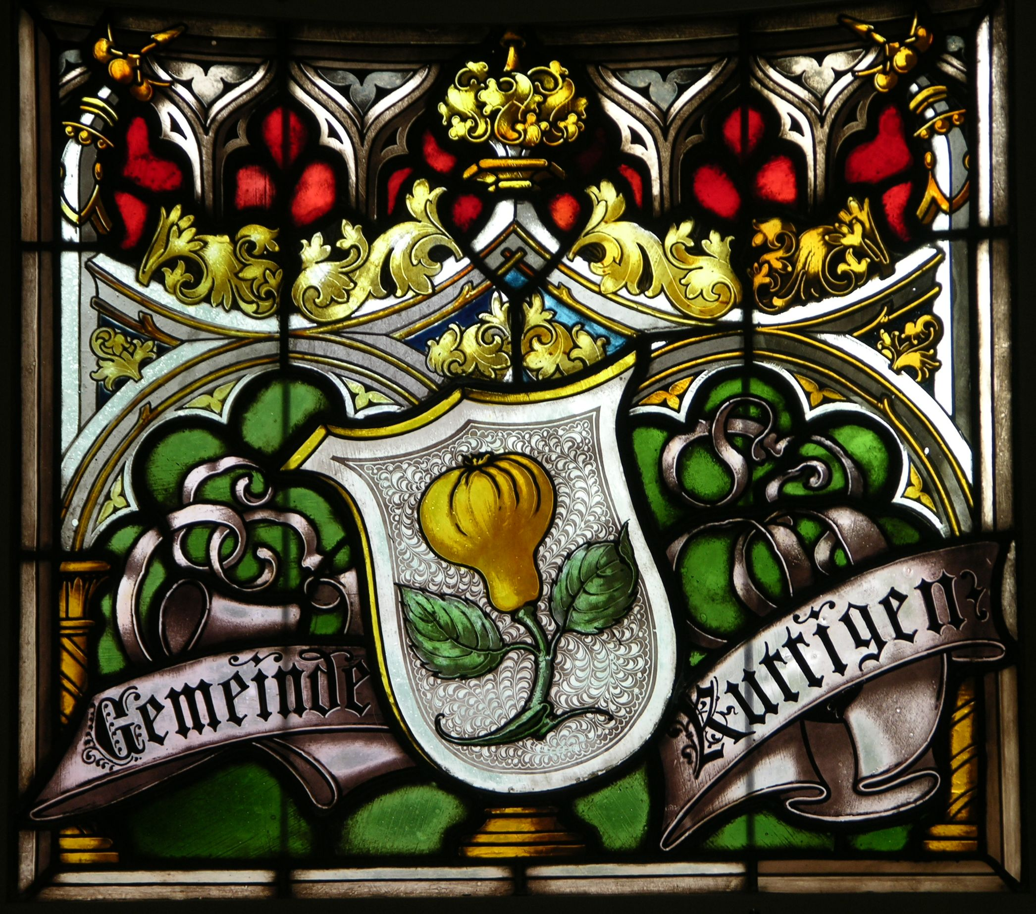 Altes Wappen Küttigens im Karl-Moser-Haus der Alten Kantonsschule Aarau